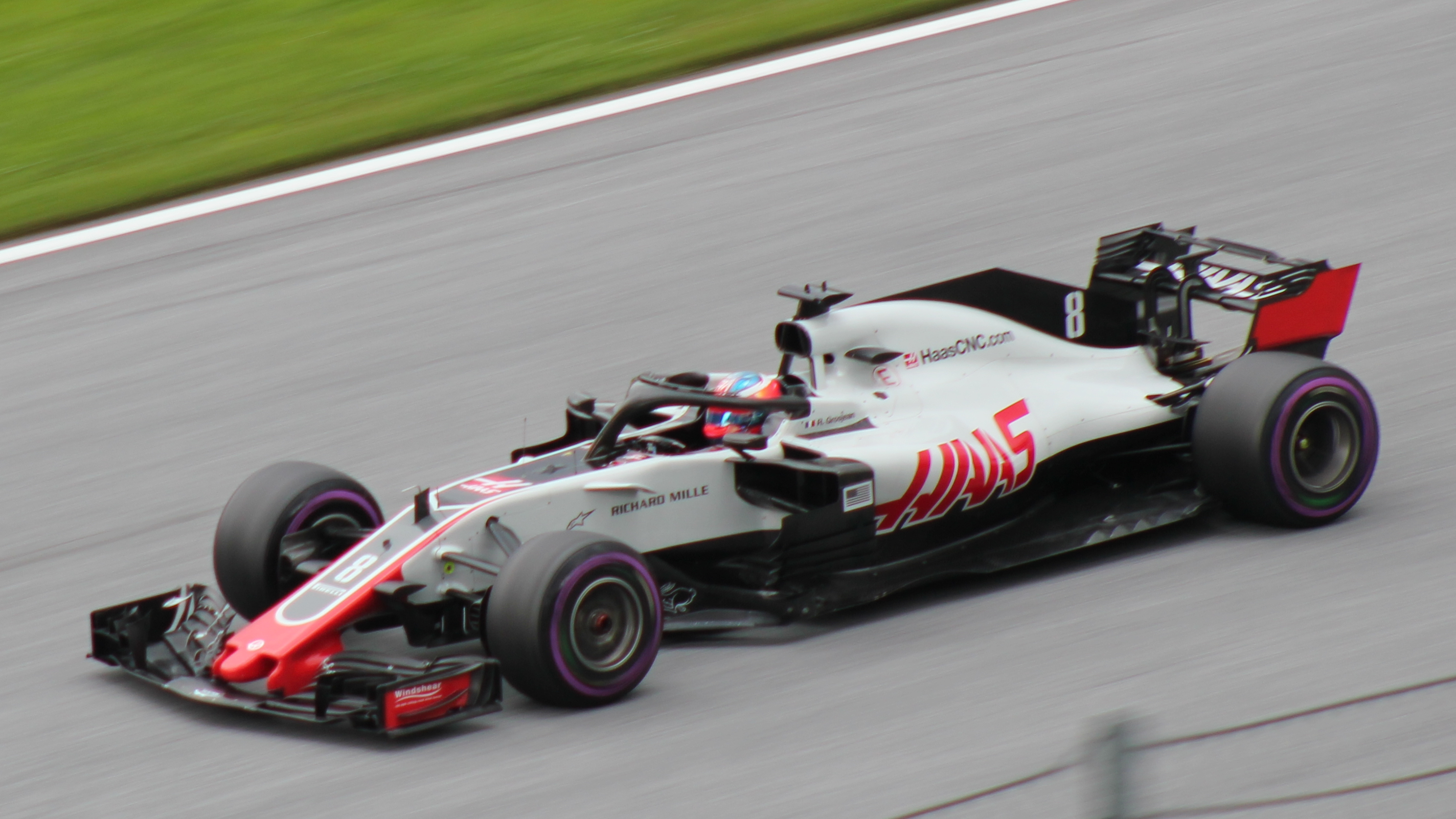 8 Grosjean beim Rennwochenende in Österreich 2018